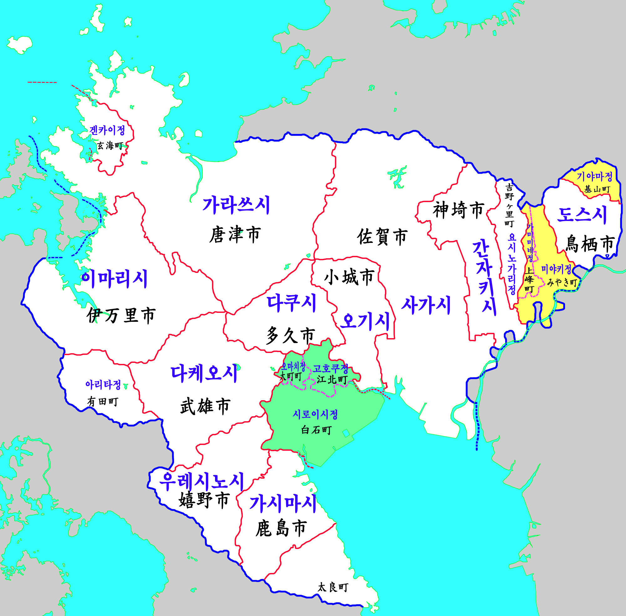 사가현 행정구역